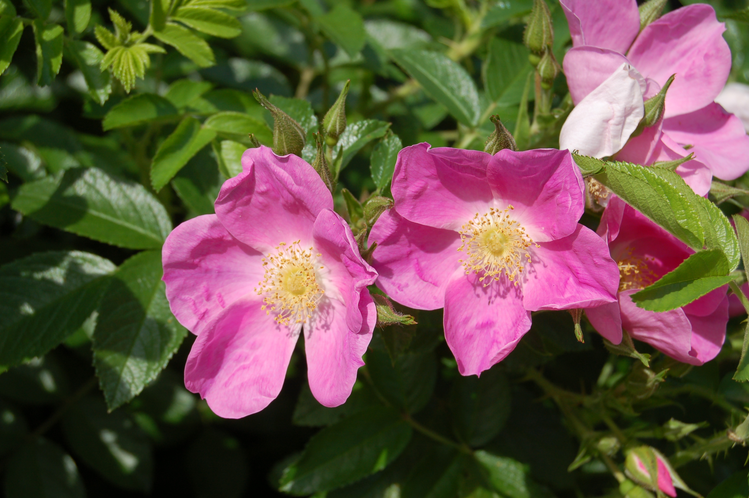 Rosa 'Roselina'